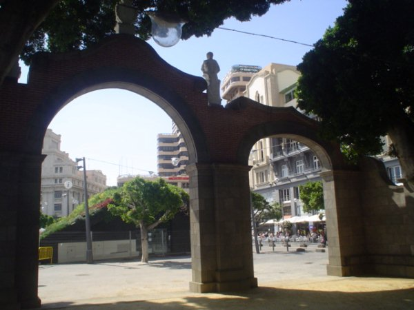 Arco La Alameda del Duque Santa Elena